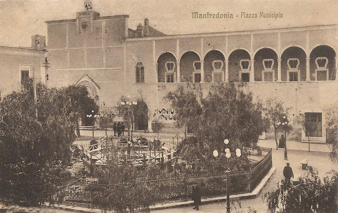 Palazzo san Domenico, piazza della libertà, primi del '900 - Manfredonia